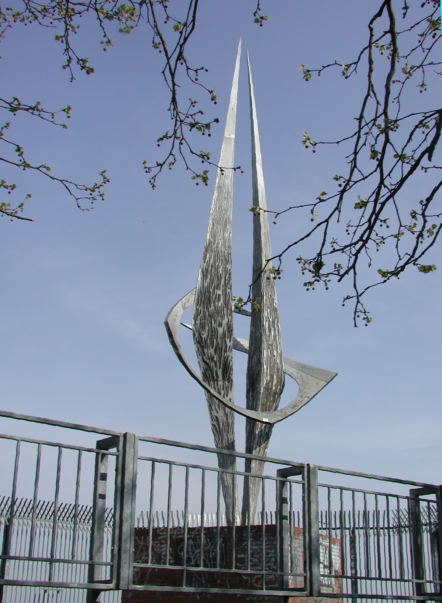 Das Mahnmal für die Einheit Deutschlands auf der Humboldthöhe (Volkspark Humboldthain), von Arnold Schatz, 1967, Aluminium